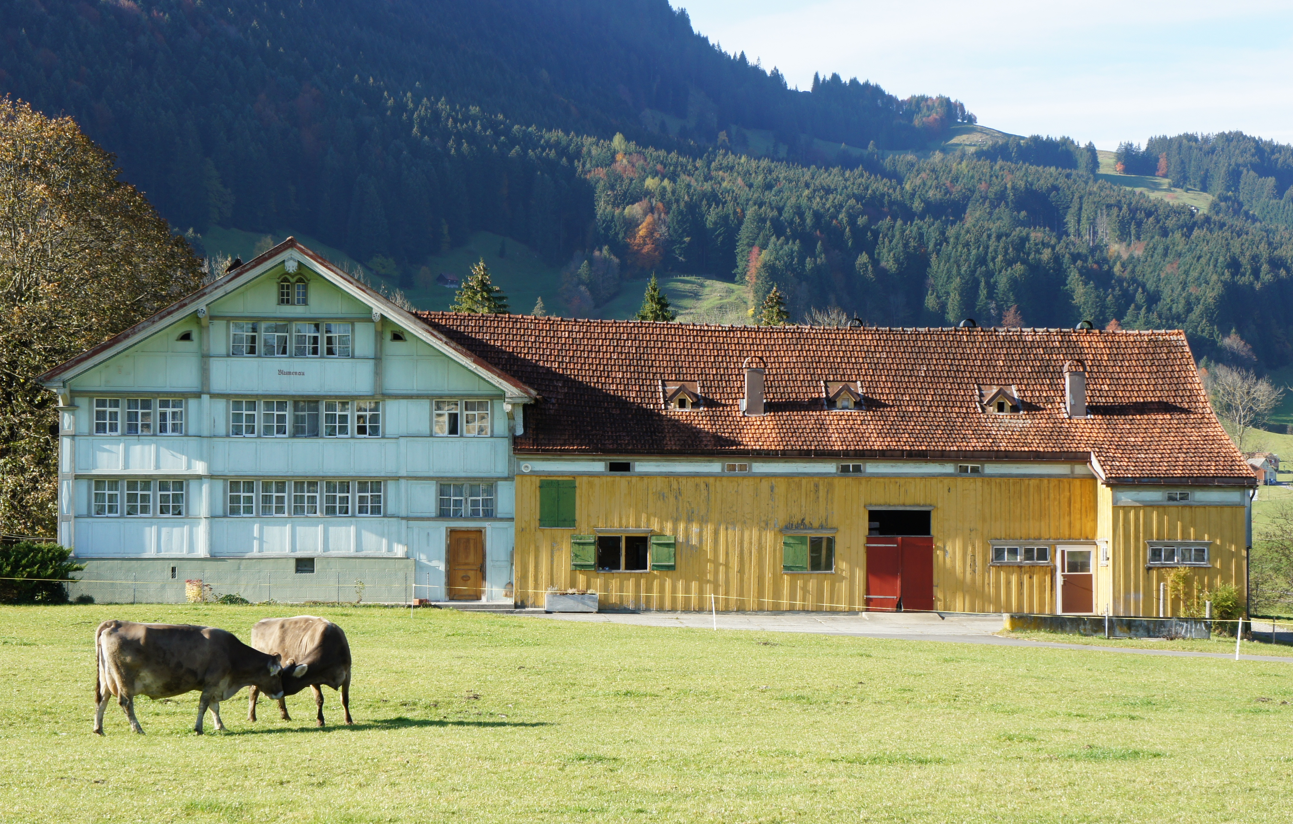 Blick aus Nordosten auf das Bauernhaus Blumenau in Steinegg (Bezirk Rüte). Links steht das Wohnhaus mit Hauptfassade (helle, graublaue Farbe) und Eingang auf die Nordost-Seite gewandt. Rechts ist der Stall in Kreuzgibelform zum Haus angebaut. Seine Fassade im, für das Appenzellerland typischen gelben Farbe. Die Fensterläden am Stall sind grün, das Stalltor ist rot. Der linke Teil des Kellergeschosses beim Wohnhaus ist gemauert, der andere Teil des Hauses, sowie der Stall sind aus Holz. Im Vordergrund weiden Kühe auf der Wiese.